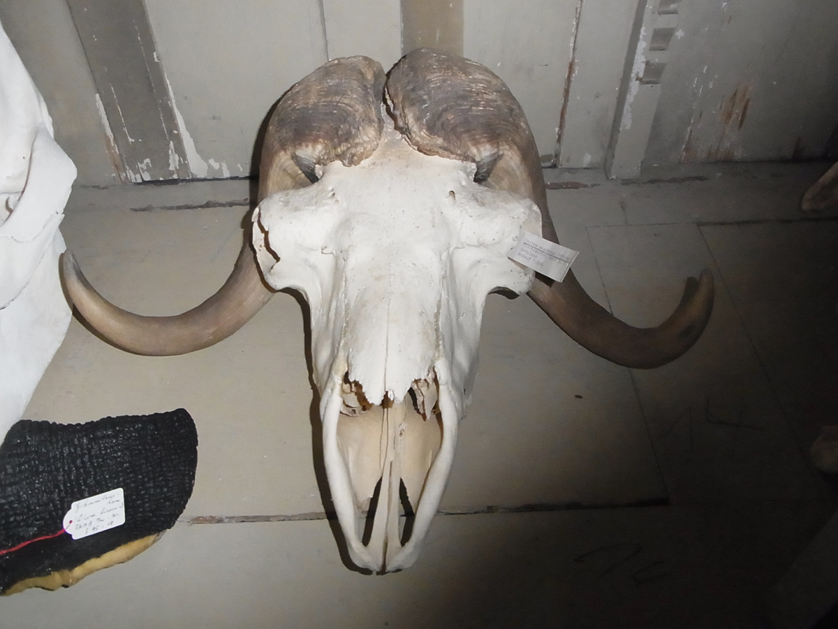 Objekte aus der Naturwissenschaftlichen Sammlung der Stiftung Stadtmuseum Berlin